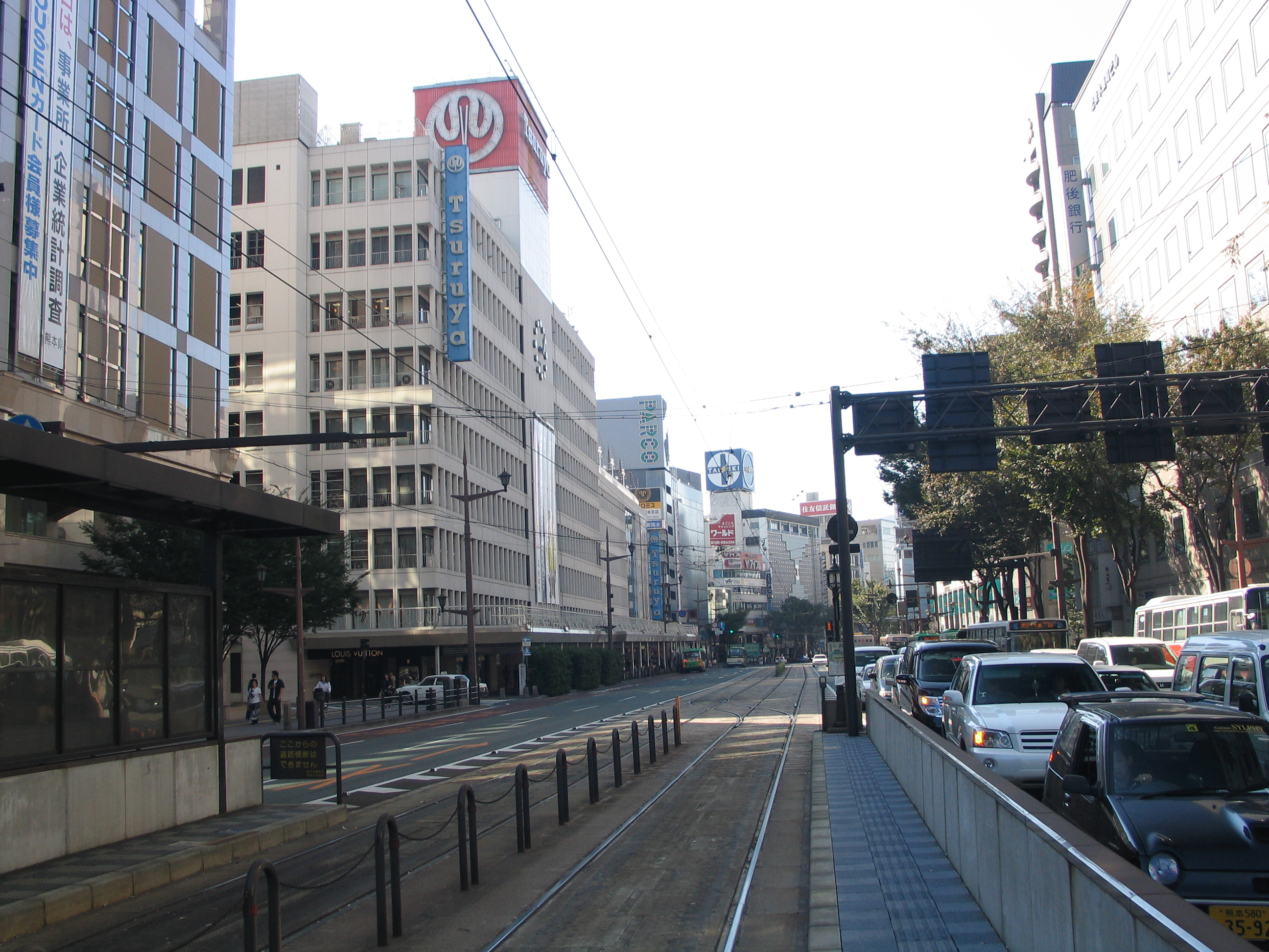 Toricyosuji